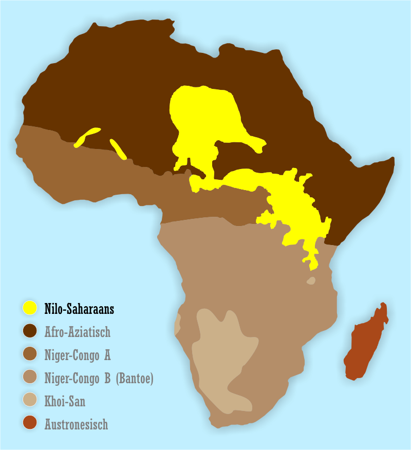 Kaart die een indruk geeft van de verspreiding van de Nilo-Saharaanse talen in Afrika. Bronnen: zie nl::en:Image:African language families.png. Gemaakt door Mark Dingemanse. Vrijgegeven onder de Creative Commons Naamsvermelding 2.0 licentie